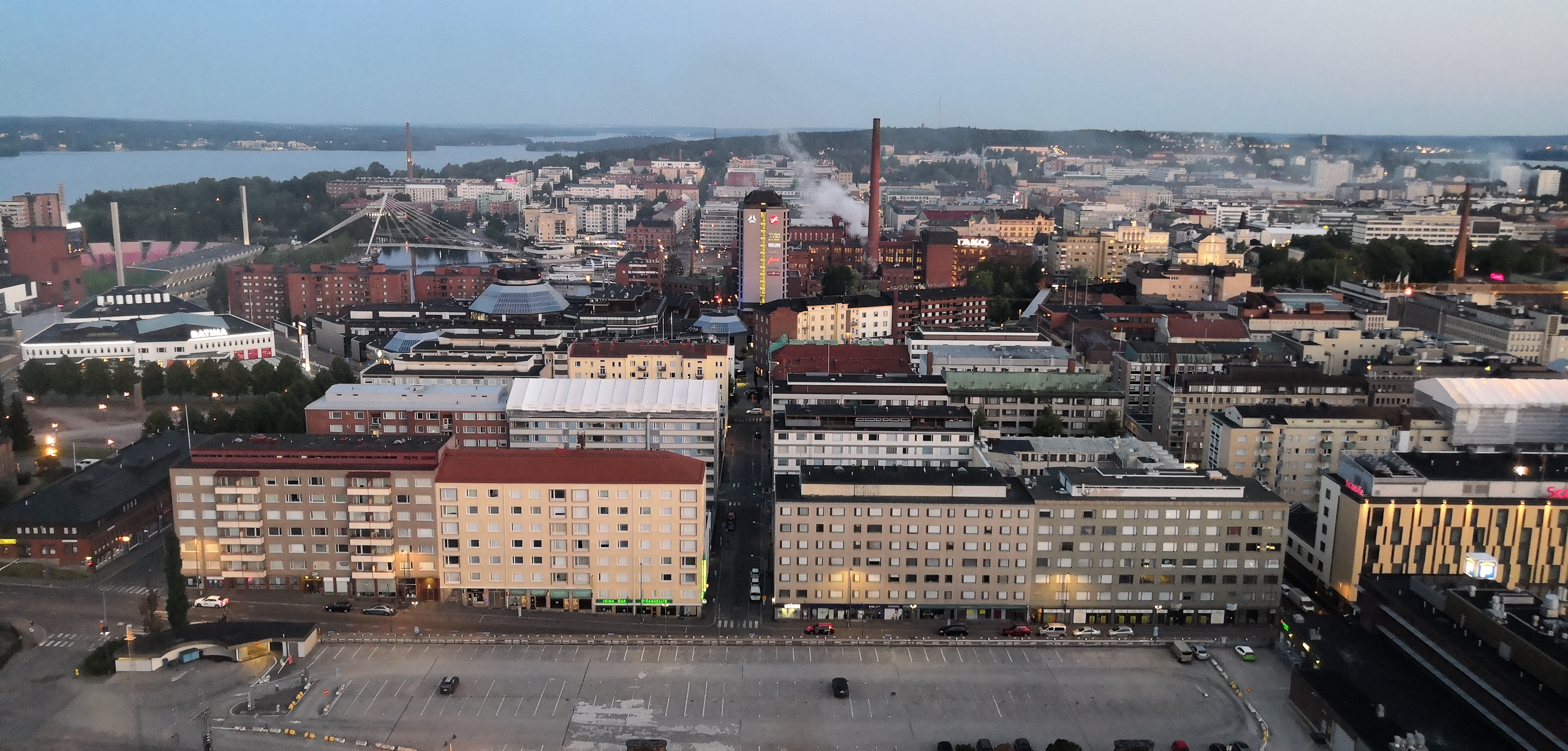 Tampereen keskusta Torni-hotellista kuvattuna aamuyöllä